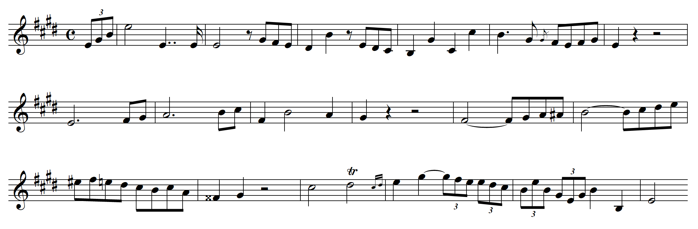 Hauptthema 1. Satz, Hummel Trompetenkonzert